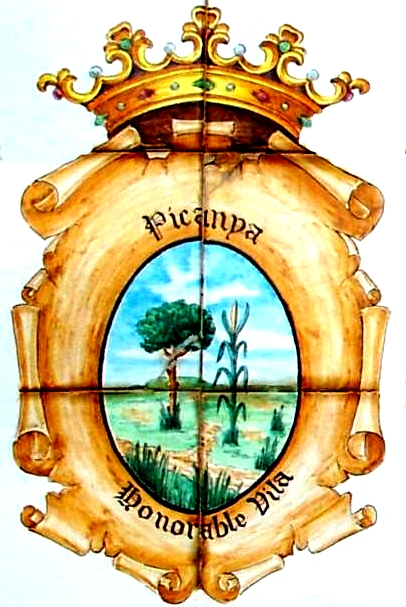 Escut de Picanya extret d'un taulell any 2007